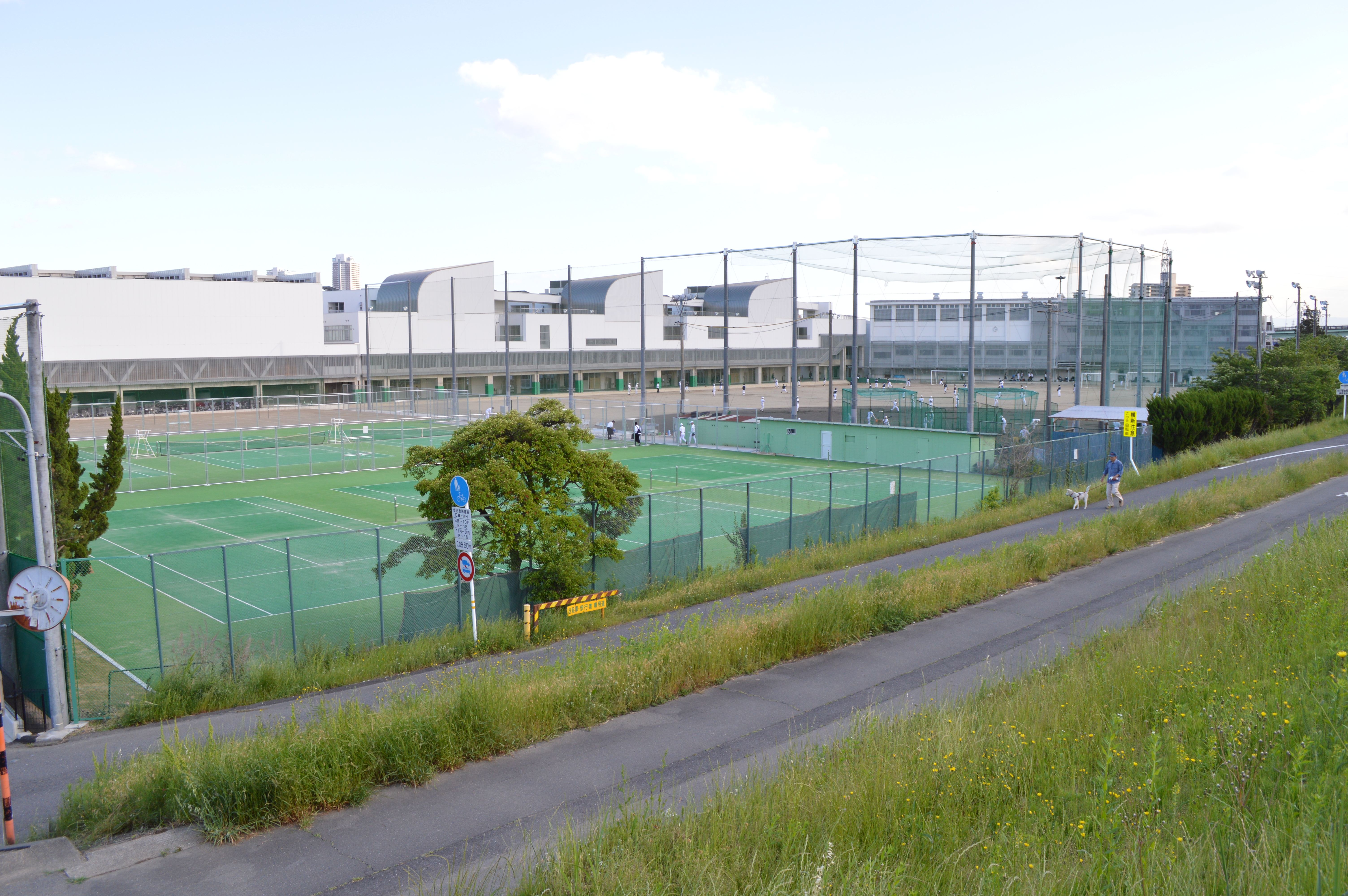 Gifu (岐阜県立岐阜高等学校),Gifu,Gifu,Japan(岐阜県岐阜市)で撮影